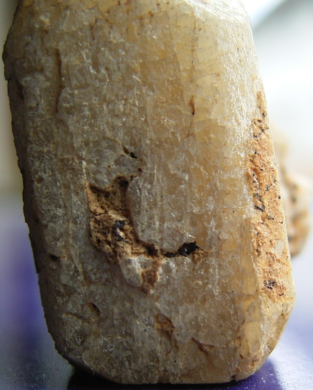 Anorthit_Miyake,Japan